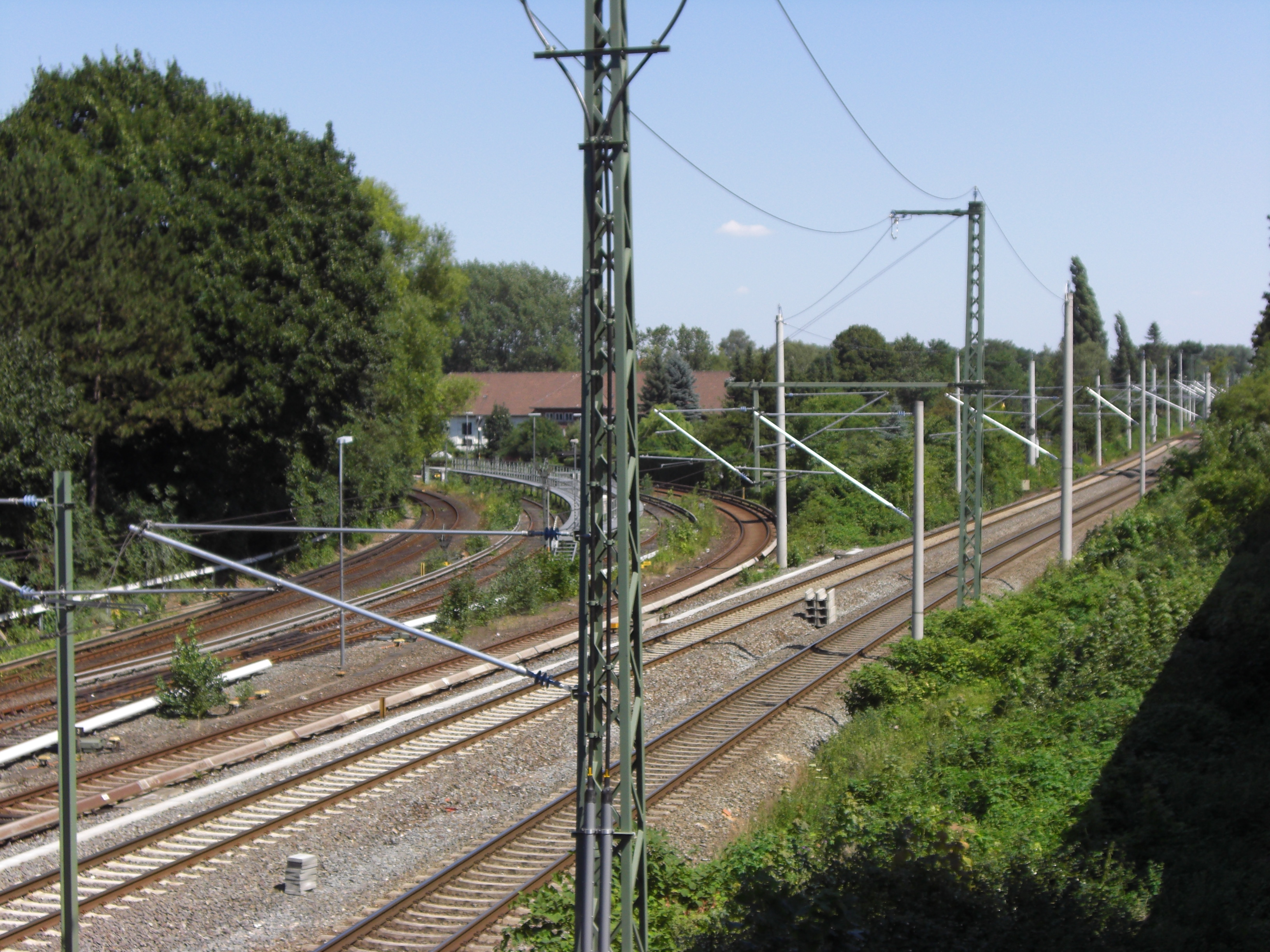 Vorgehaltene Flächen für den Ausbau des S-Bahn Hamburg. Blick in Richtung Nordosten, links im Bild die Strecke der Linien S1 und S11 nach Poppenbüttel und Abstellgleise für S-Bahn, rechts die Strecke nach Lübeck.